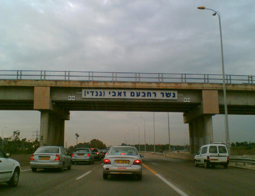 גשר על שם רחבעם זאבי, רמת השרון.